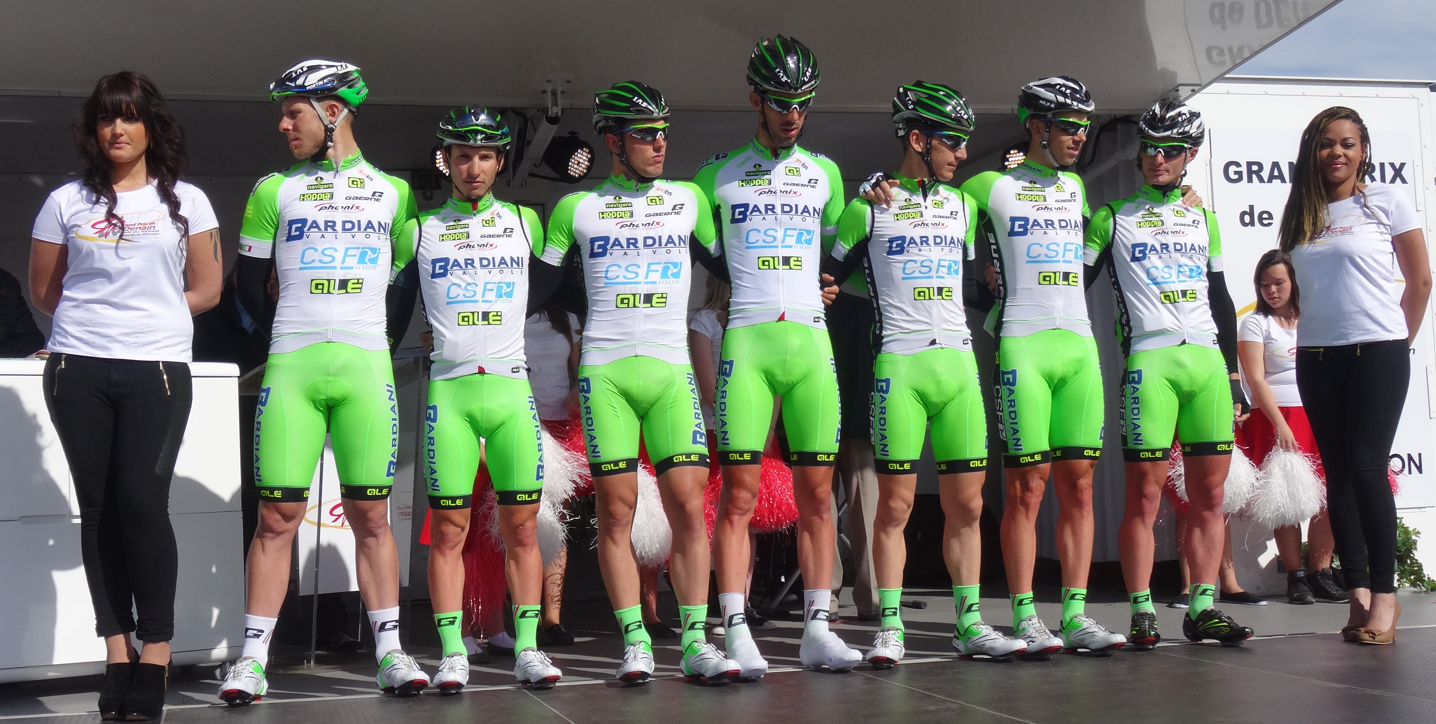 Reportage réalisé le jeudi 17 avril à l'occasion du départ et de l'arrivée du Grand Prix de Denain 2014 à Denain, Nord, Nord-Pas-de-Calais, France.